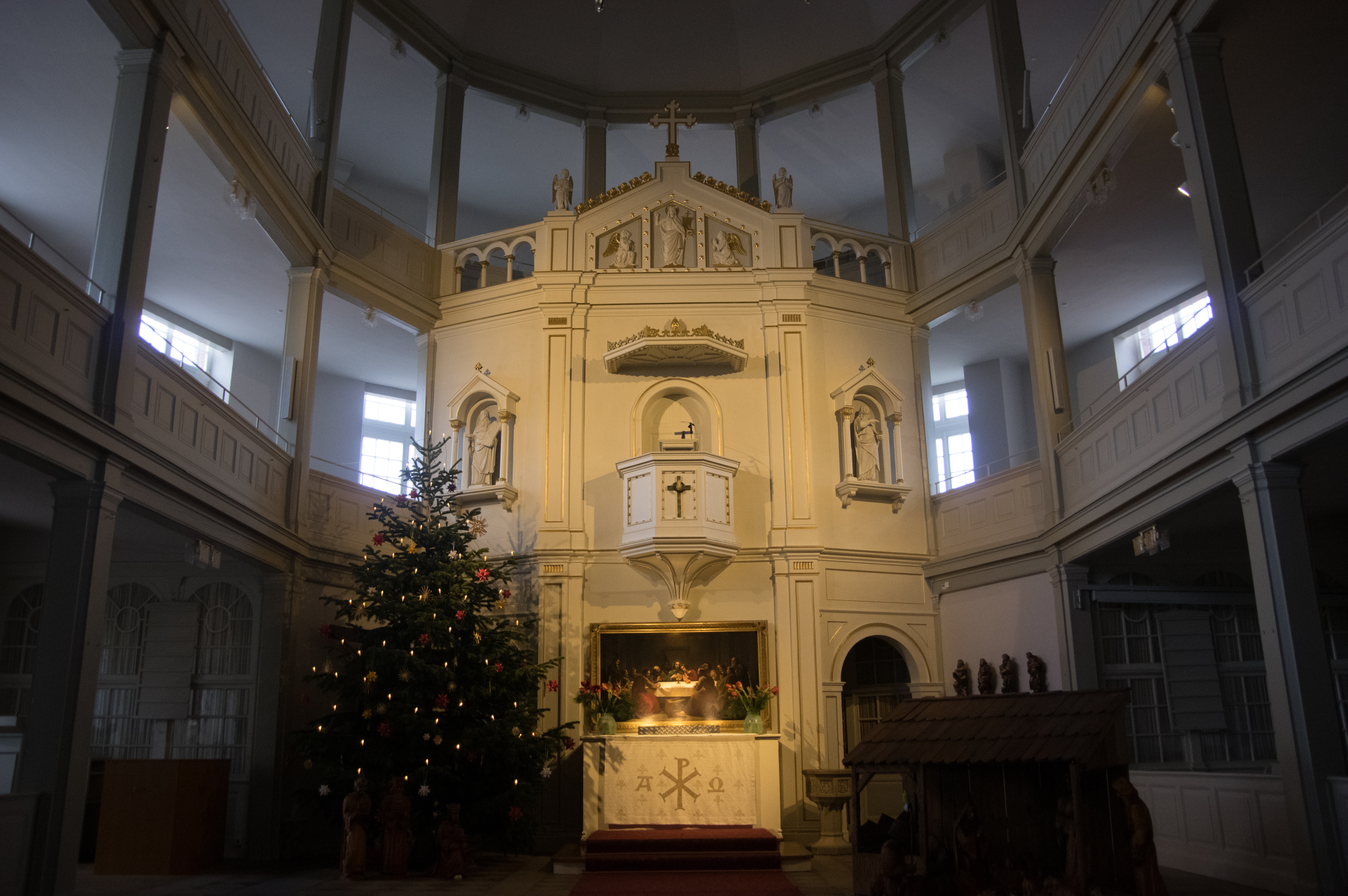 Walsrode in Niedersachsen. Die Stadtkirche steht unter Denkmalschutz.